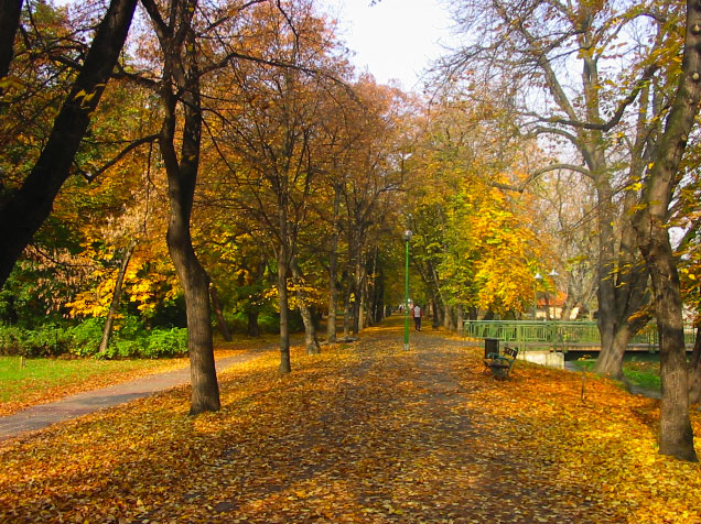 Eger, Táncsics sétány. (saját fotó)